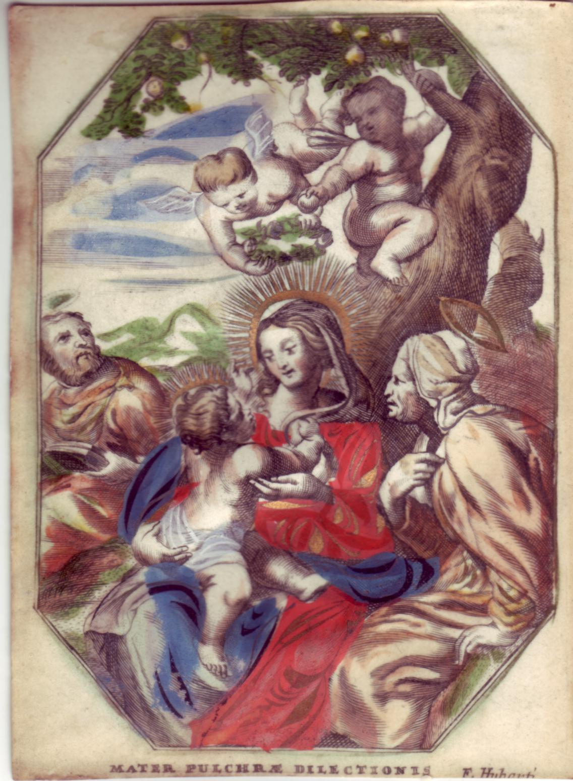 taille douce rhaussée de couleurs